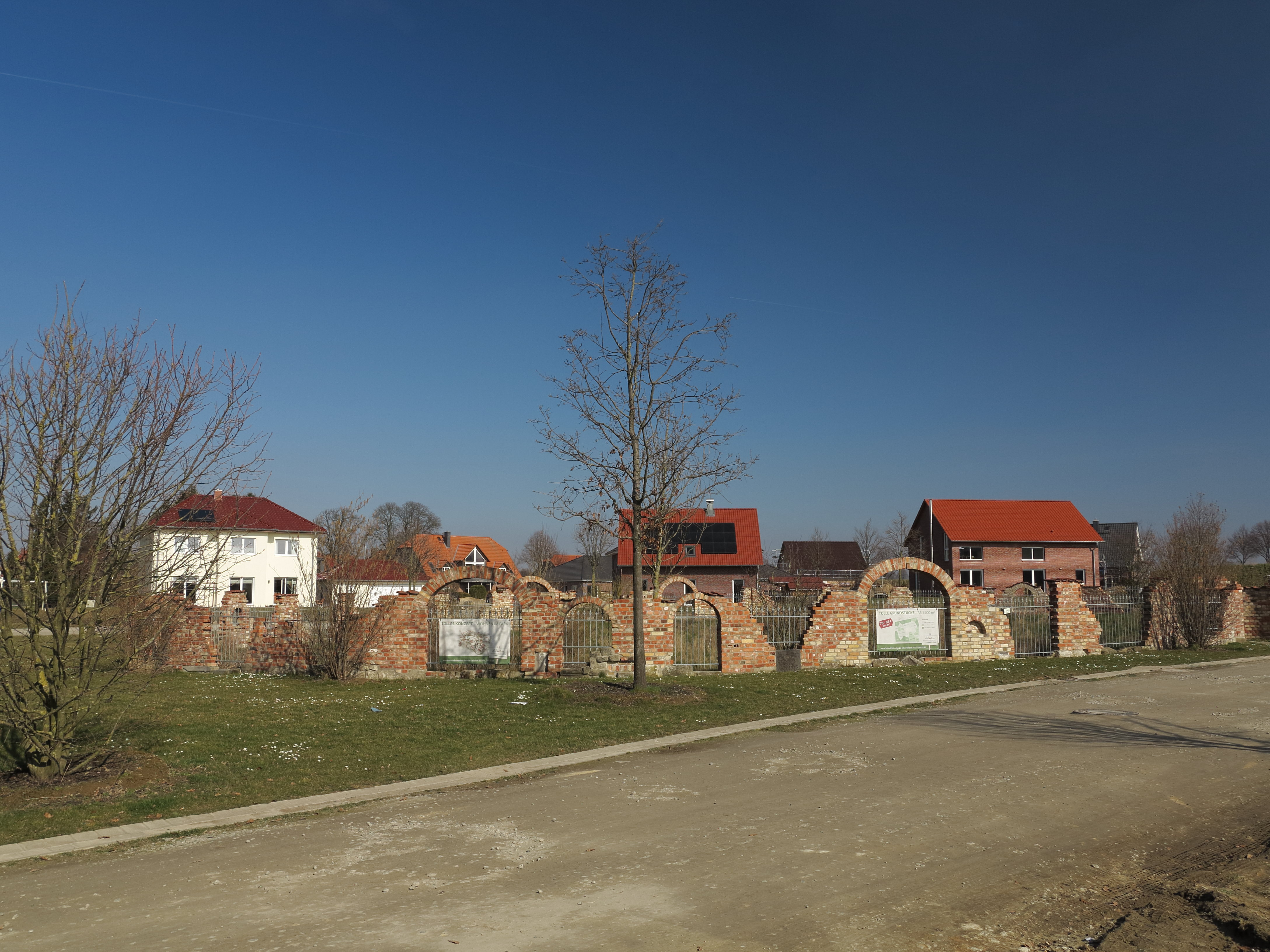 Die Heinrichshöhe als Neubaugebiet in der Ortschaft Klein Gleidingen